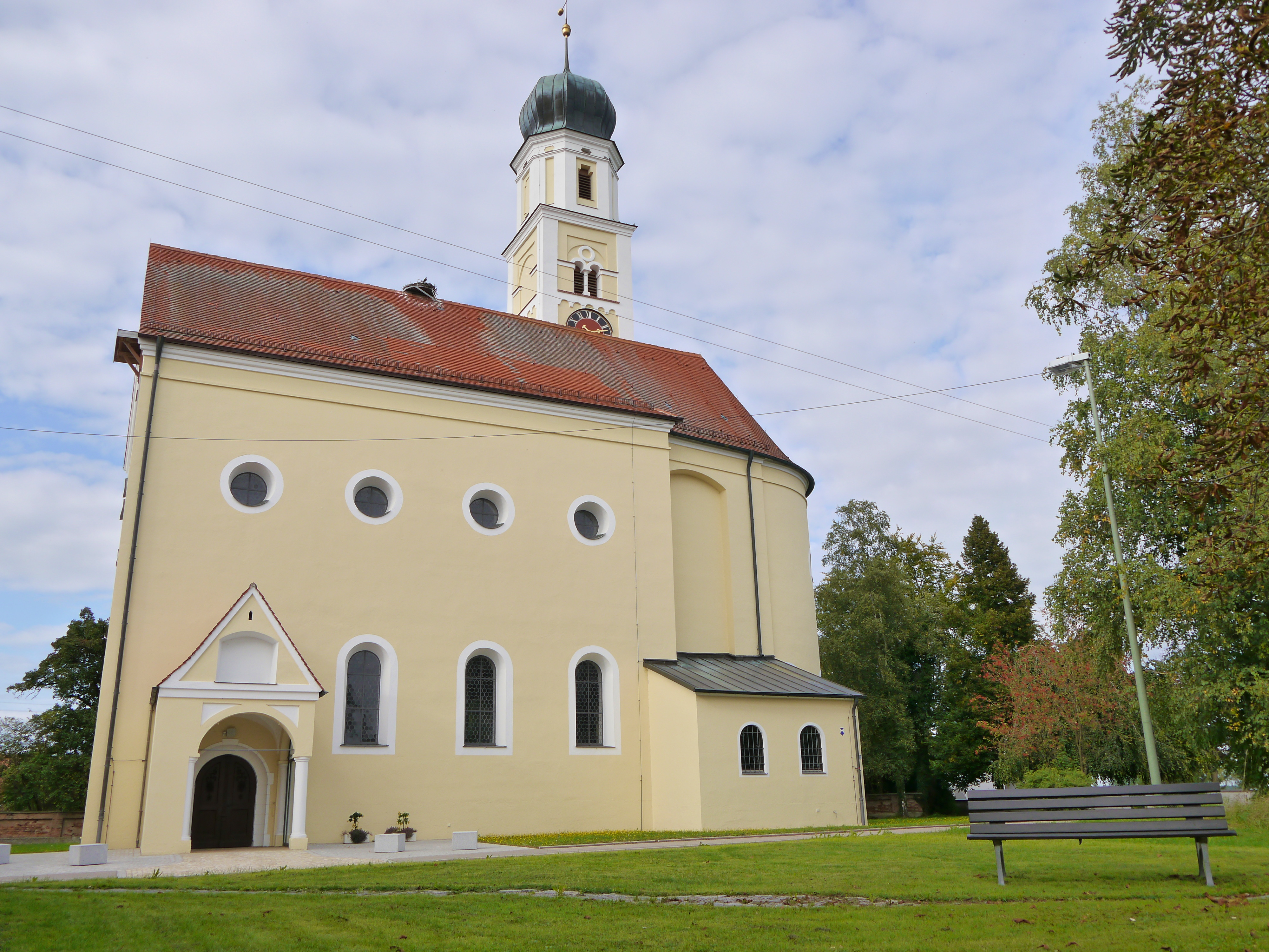 Gennach - Langerringer Straße 3 - St JohannesThis is a photograph of an architectural monument.